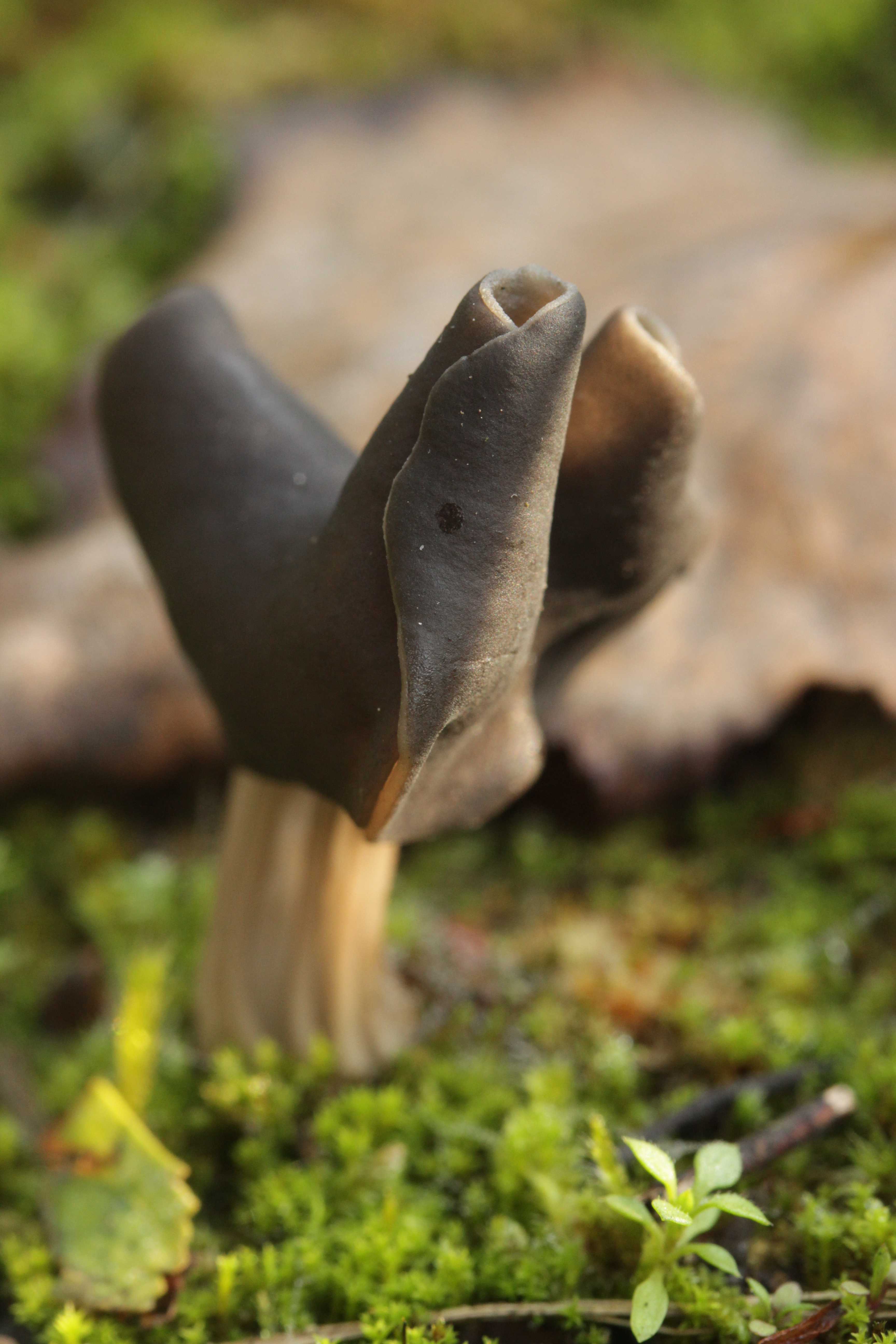 Slate Grey Saddle - Helvella lacunosa